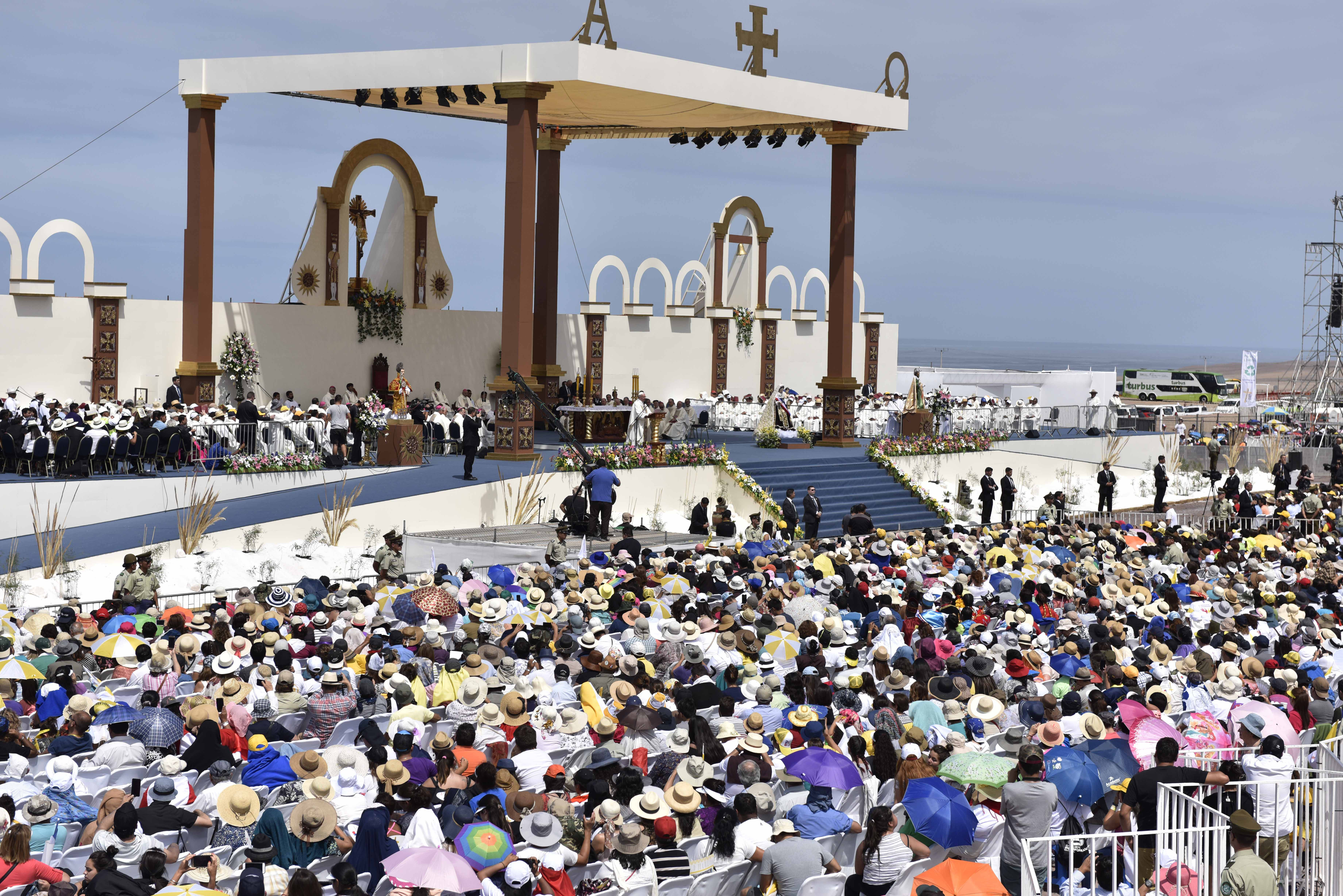 Este jueves llegó a Iquique el Papa Francisco para finalizar su visita por Chile, la cual comenzó el lunes 15 de enero en la ciudad de Santiago. El campus Lobito, al sur de la capital regional, fue el escenario para que el Santo Padre entregara su mensaje final, donde destacó a Iquique como una “tierra de sueños” para los extranjeros que llegan a la región de Tarapacá. La presidenta Michelle Bachelet fue la encargada de despedir a Su Santidad, momento en que aprovechó de agradecer a la comitiva organizadora y a los chilenos que acompañaron esta visita Papal. Visita de Francisco a Iquique, Chile. campus Lobito, al sur de la capital regional.